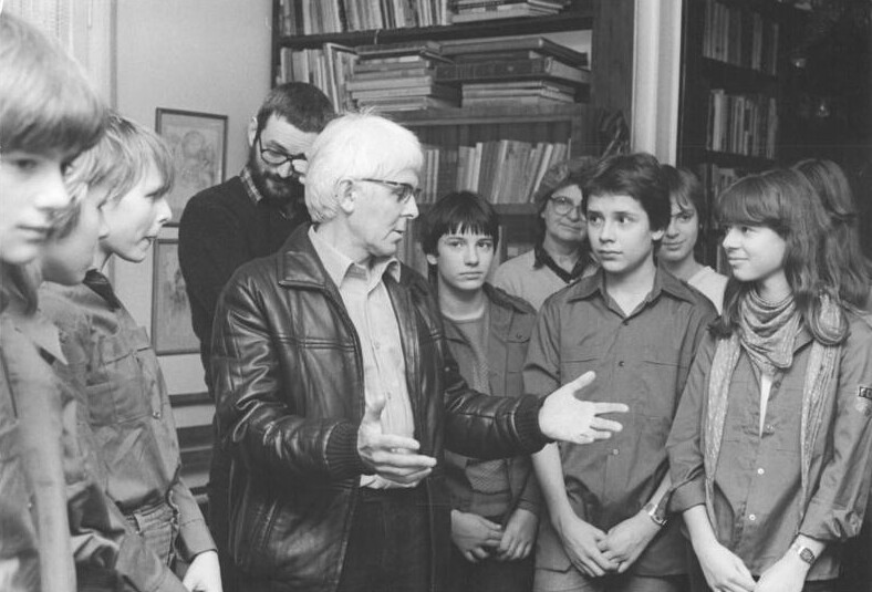 Berlin, Jugendstunde mit Benno Pludra ADN-ZB Senft 25.1.84 Berlin: Jugendstunde. Jungen und Mädchen der 8b der J.R.-Becher-OS aus Pankow diskutierten in einer Jugendstunde mit dem Schriftsteller Benno Pludra über sein Buch Insel der Schwäne. Die Veranstaltung fand im J.-R.-Becher-Haus statt.